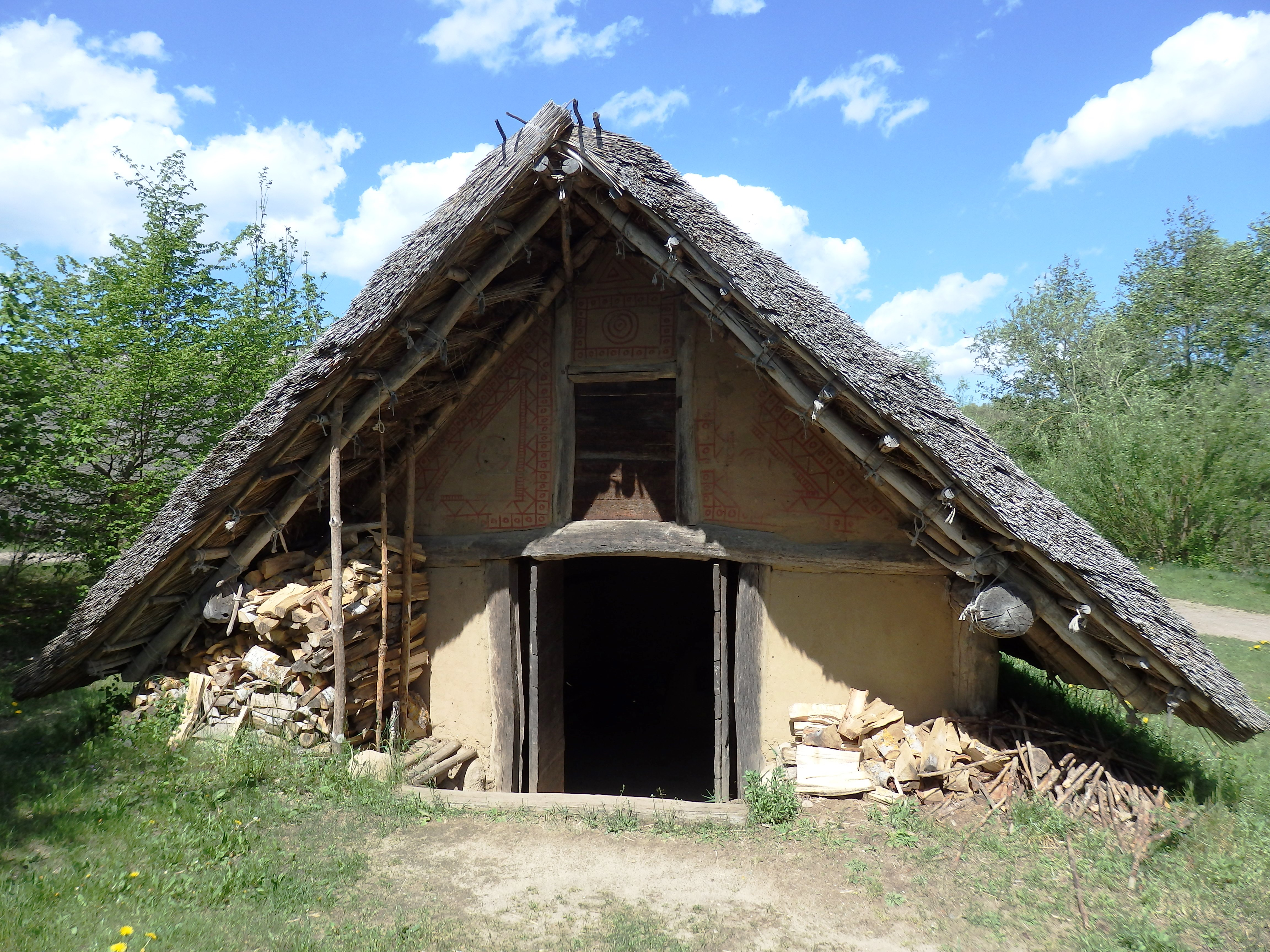 Grubenhaus